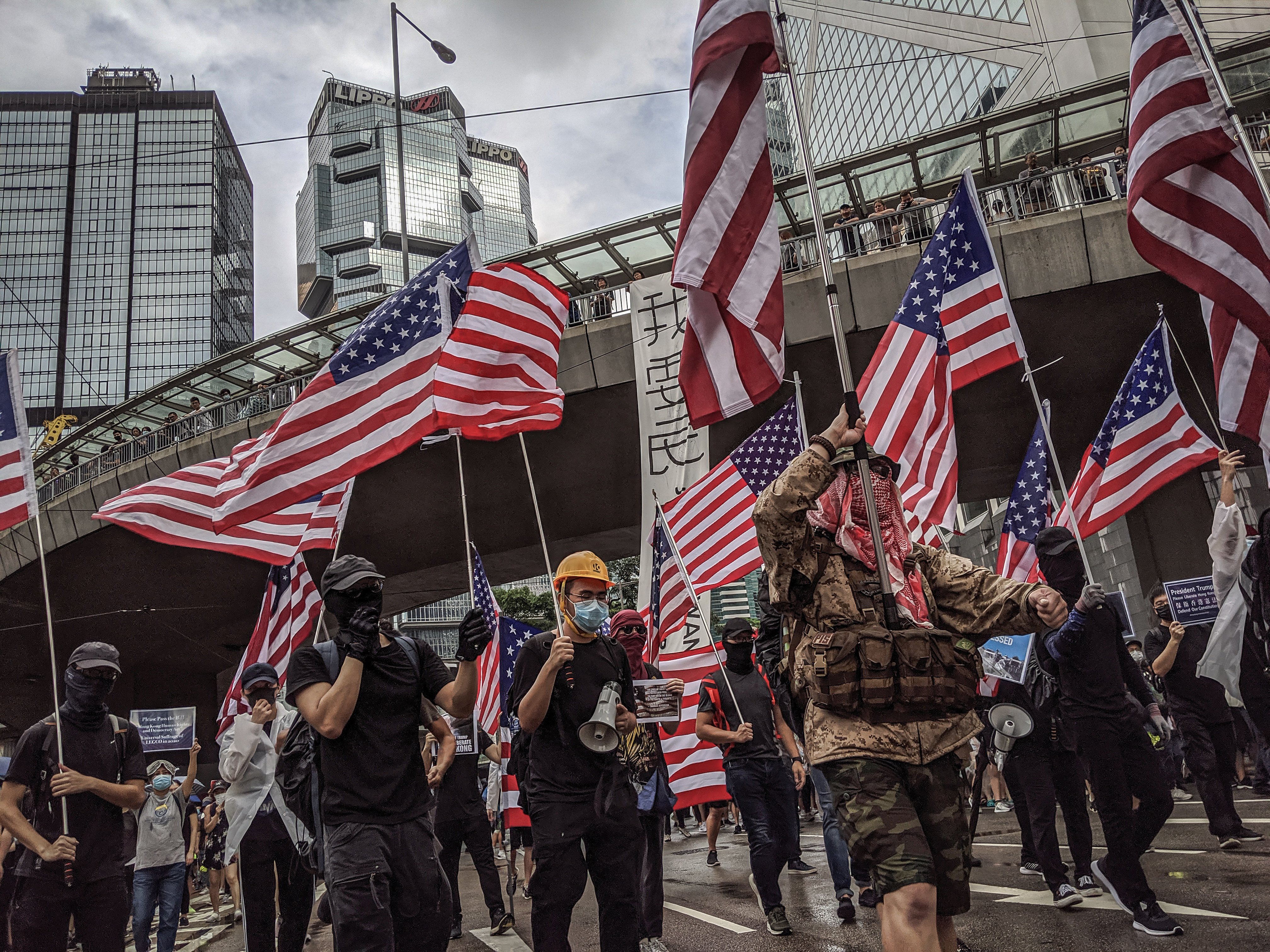 IMG_20190831_155344